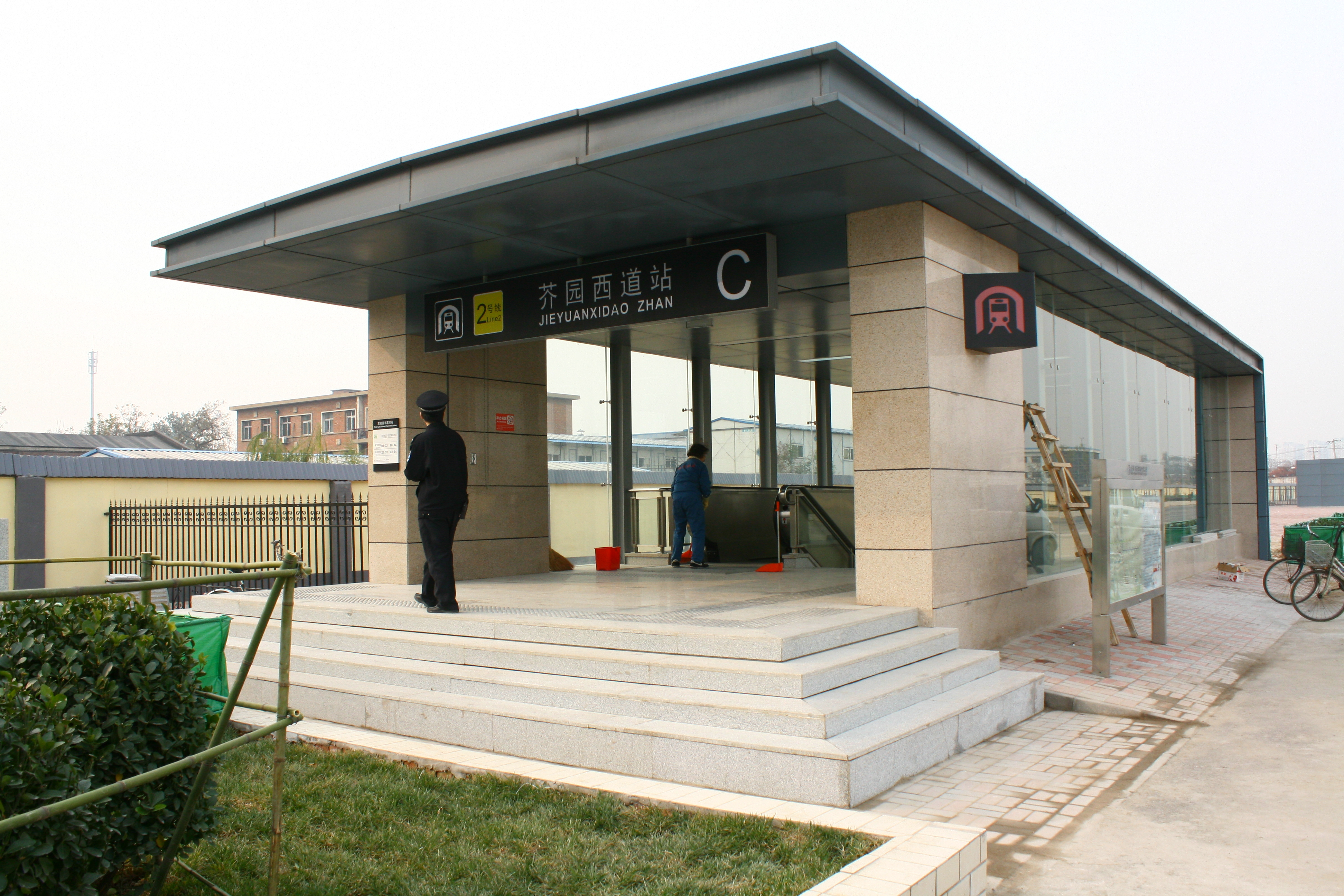 天津地鐵芥園西道站C出口 0001 2012-11-18